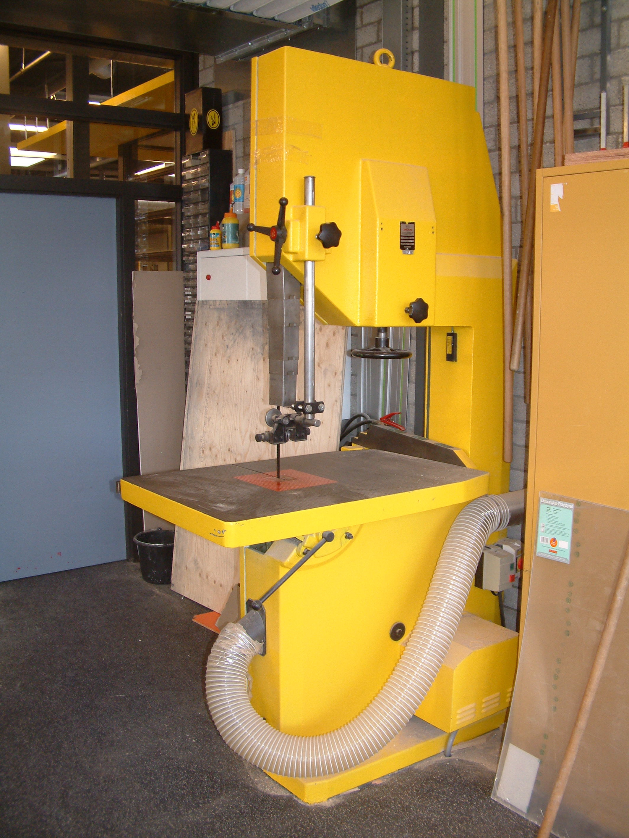 ONC Zoetermeer Lintzaag Categorie:Gereedschap